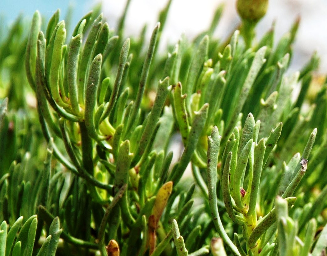 Limbarda crithmoides (L.) Dumort. Favignana, Sicily